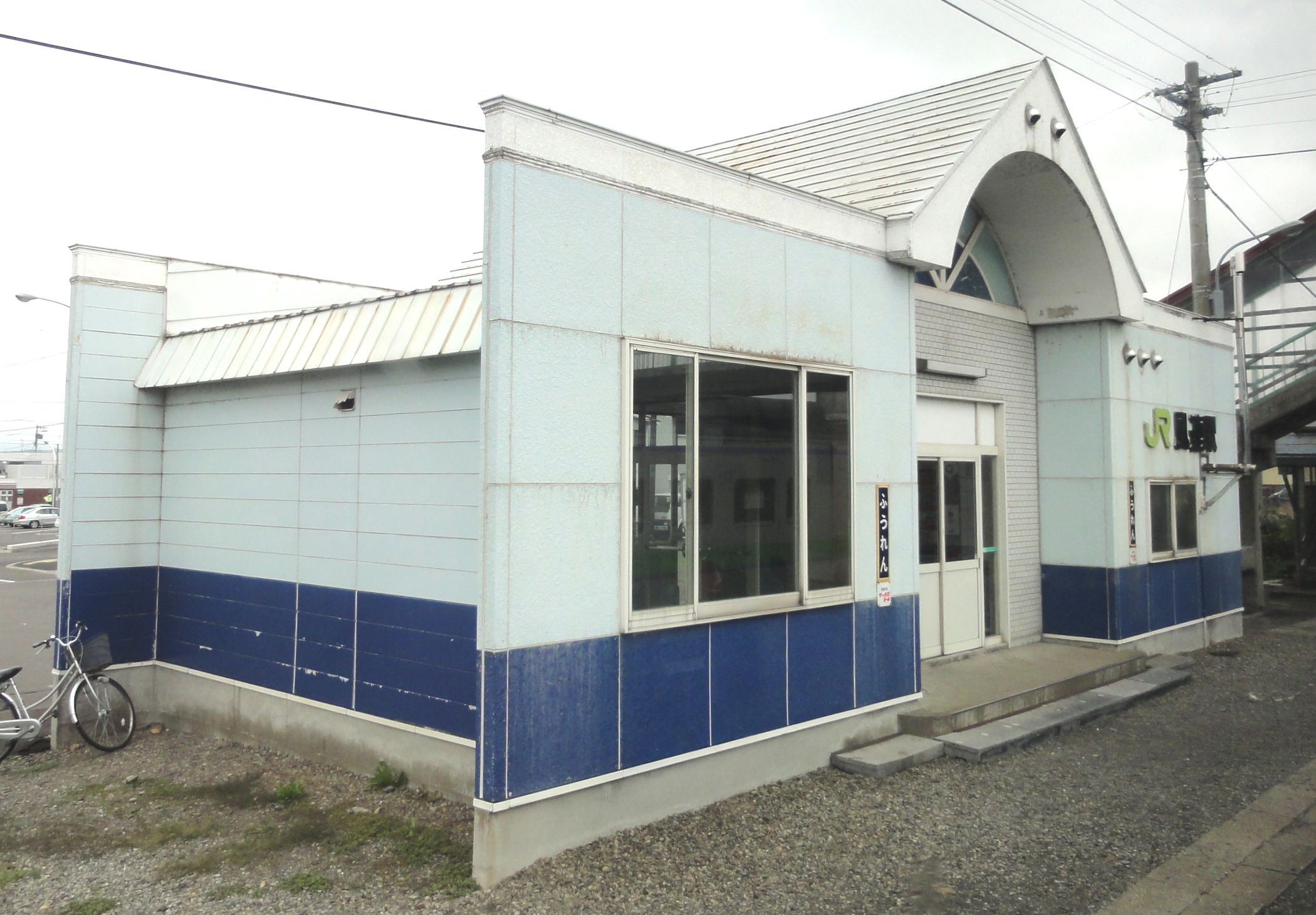 風連駅待合室